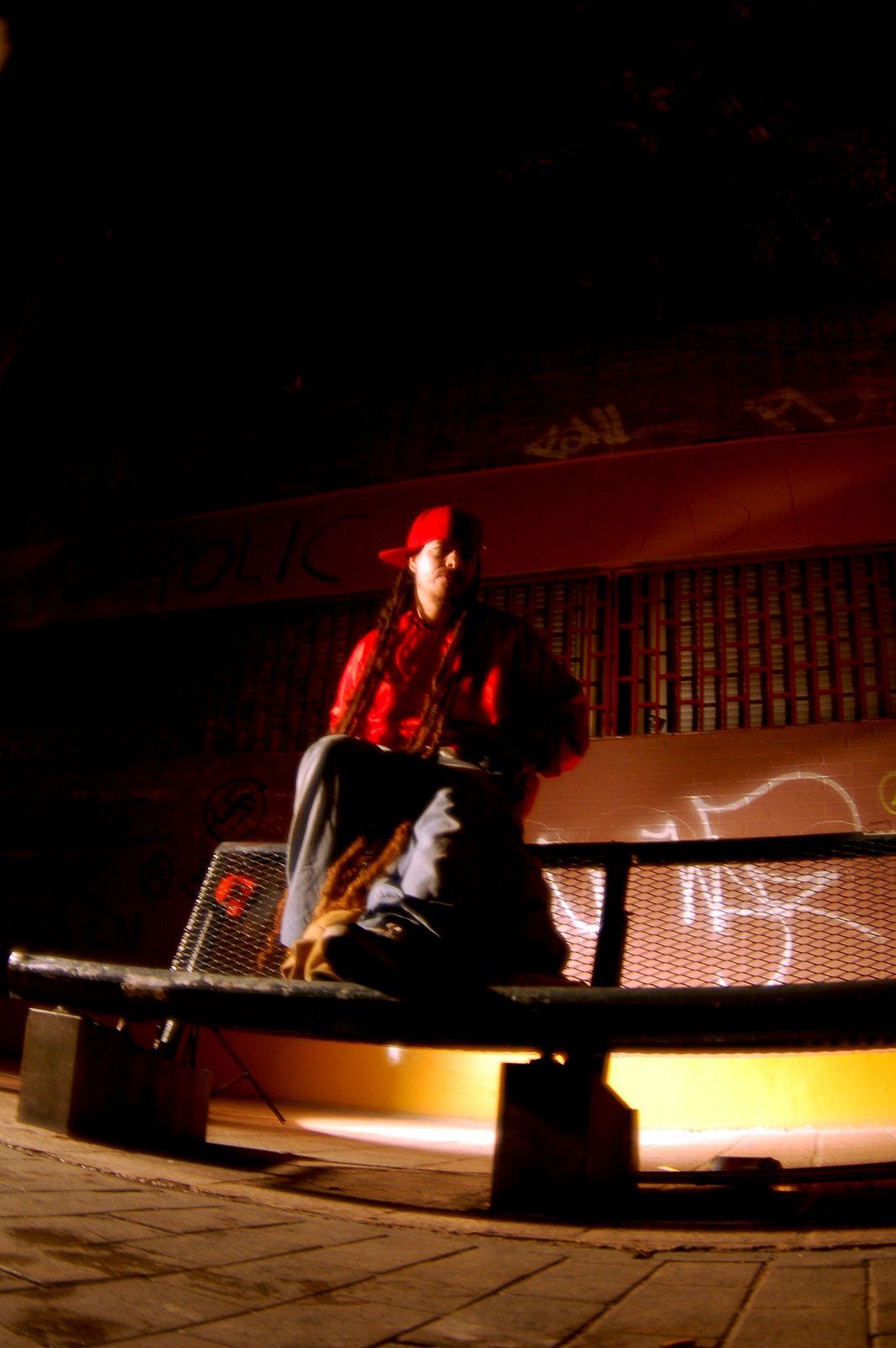 El niño de la selva (Rapsusklei) en una calle de Zaragoza